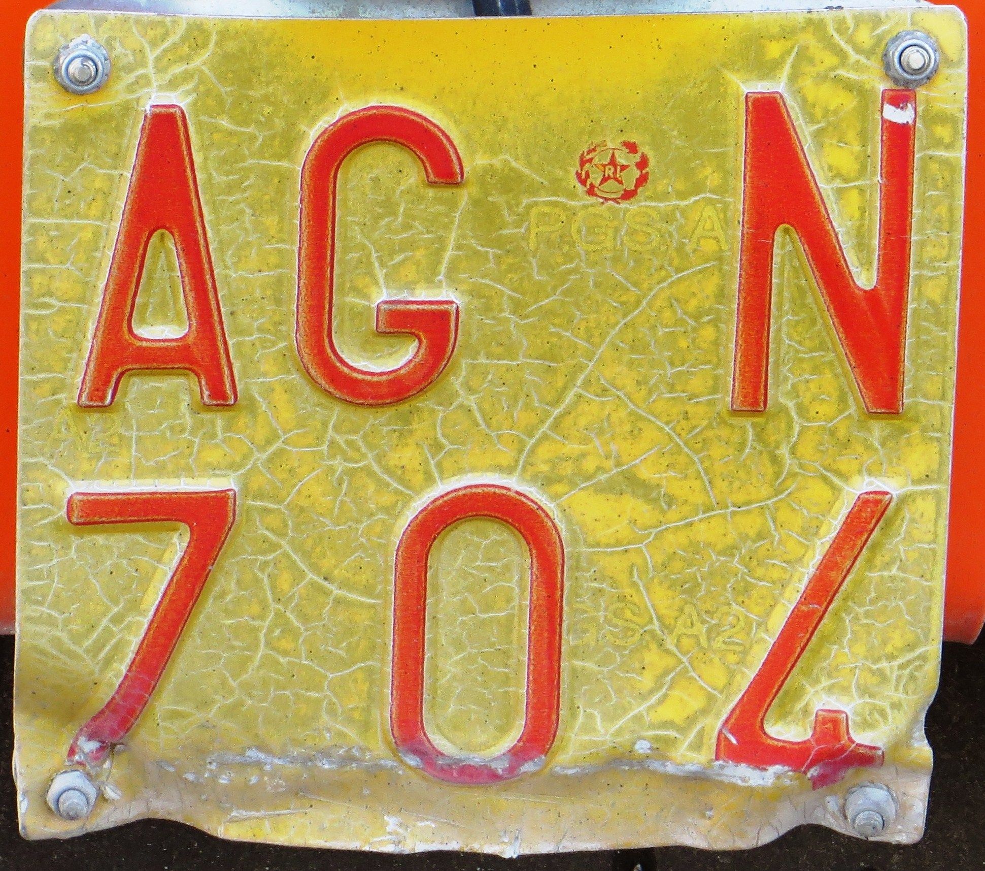 langzaam verkeer